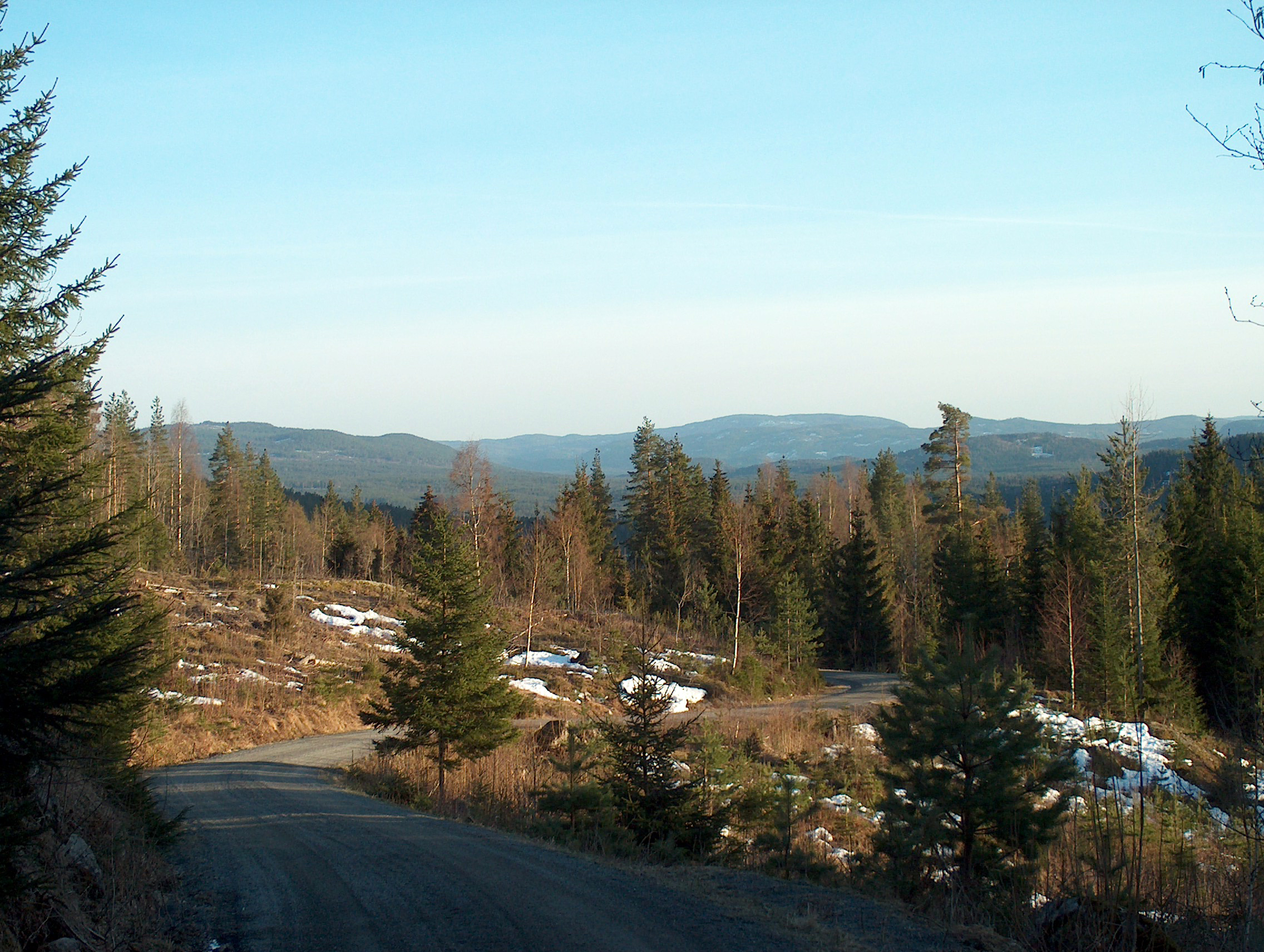 Utsyn mot Holleia fra Havikskogen